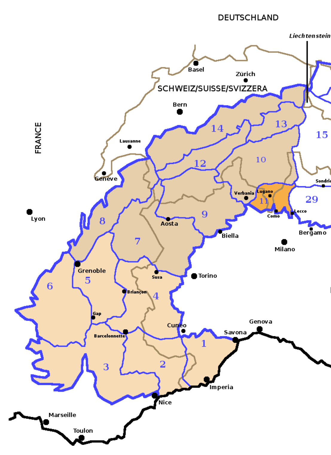 Alpi Occidentali secondo la SOIUSA con evidenziate le Prealpi Luganesi